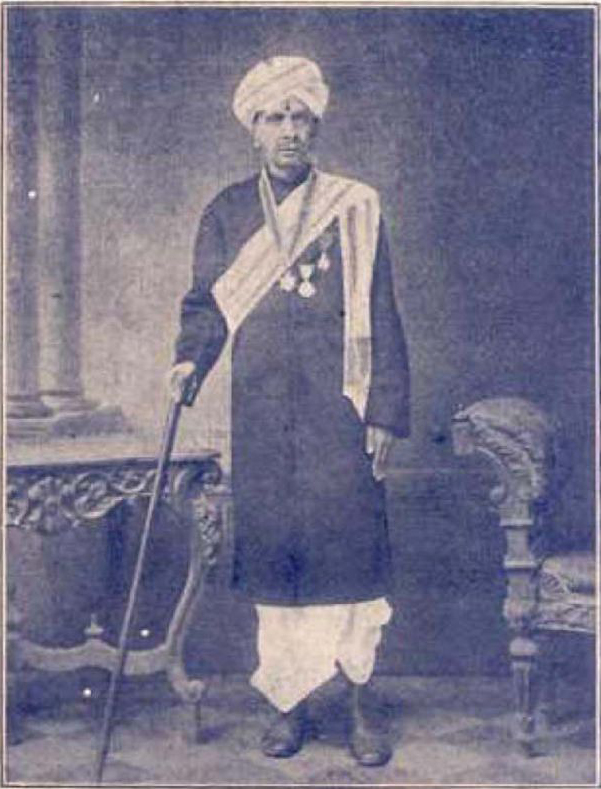 തിരുവിതാംകൂർ ദിവാനായിരുന്ന കെ. കൃഷ്ണസ്വാമി റാവു